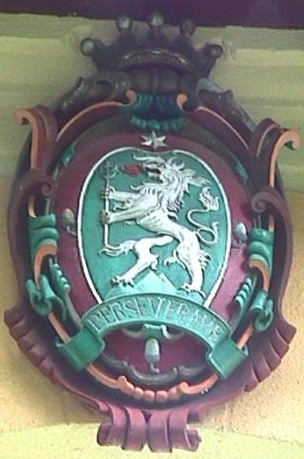 Wappen am Torbogen beim Südturm von Schloss Kassegg